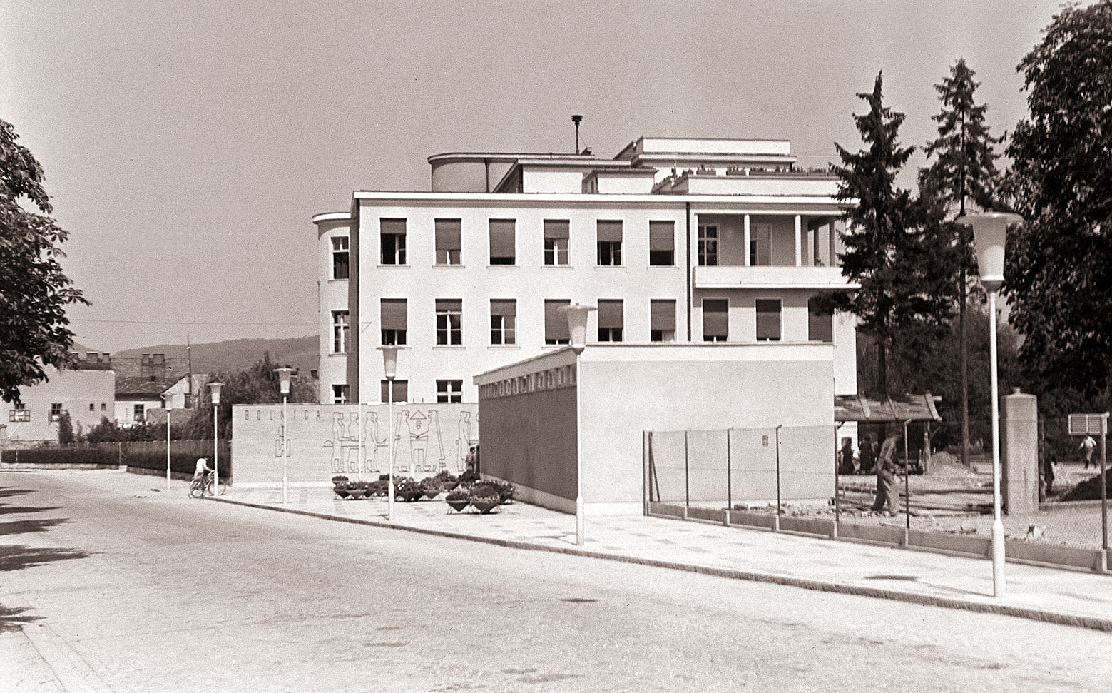 Nov vhod za pešce in motorna vozila v mariborsko bolnišnico.